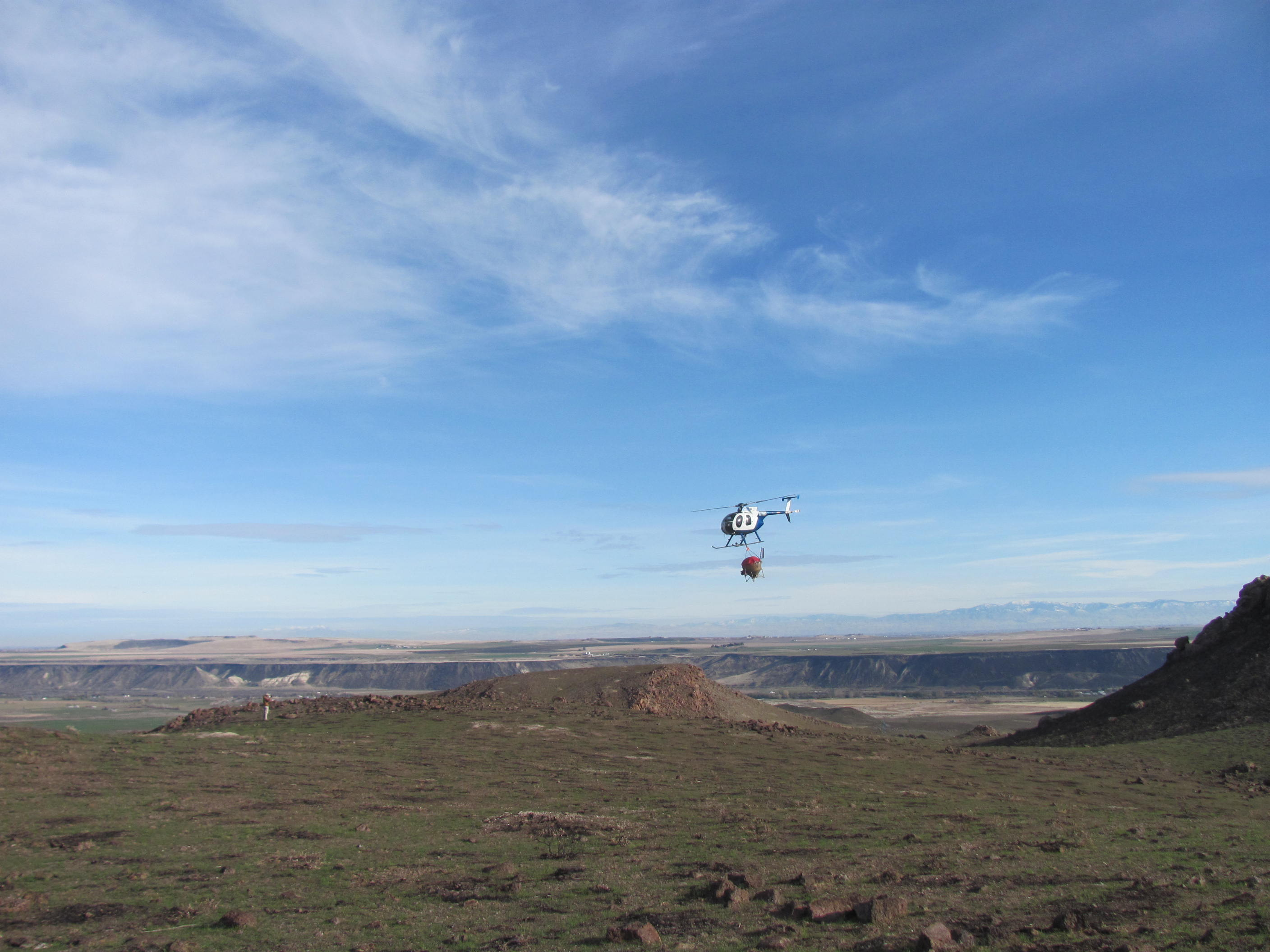 IMG_2611 Soda Fire ESR